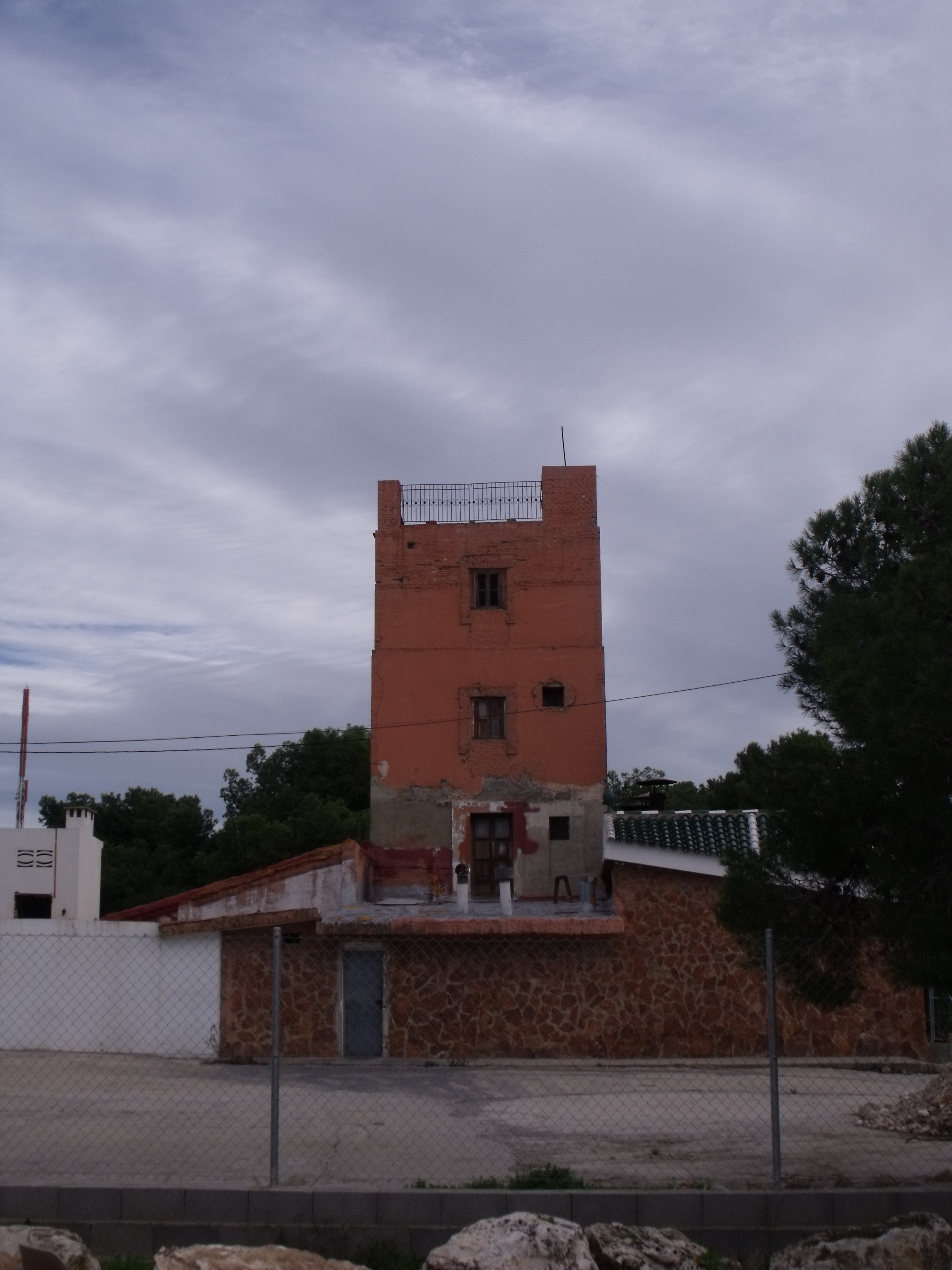 Torre de telegrafía óptica del Vedat de Torrent.